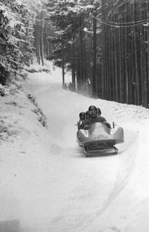 Bob der BSG-Chemie Rübeland Zentralbild TBD (Wlocka-Schaar) 1.2.54 Bob-Meisterschaften der Deutschen Demokratischen Republik vom 27. bis 31.1.54 in Oberhof Am 30.1.54 wurde auf der Wadebergbobbahn in Oberhof der erste Trainingslauf für unsere Vierer-Bobs zur DDR-Meisterschaft 1953 54 gestartet. Der Bahnrekord wurde in diesen zwei Läufen dreimal gebrochen. UBz: Der Bob der BSG-Chemie Rübeland geht in die S-Kurve.